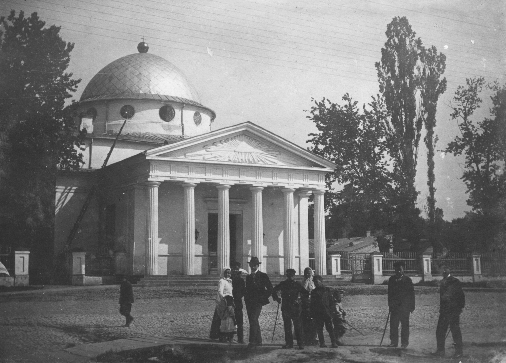 Беларуская (тарашкевіца): Магілёў (Mahiloŭ), пляц Саборны (plac Saborny). Царква Сьвятога Ёсіфа